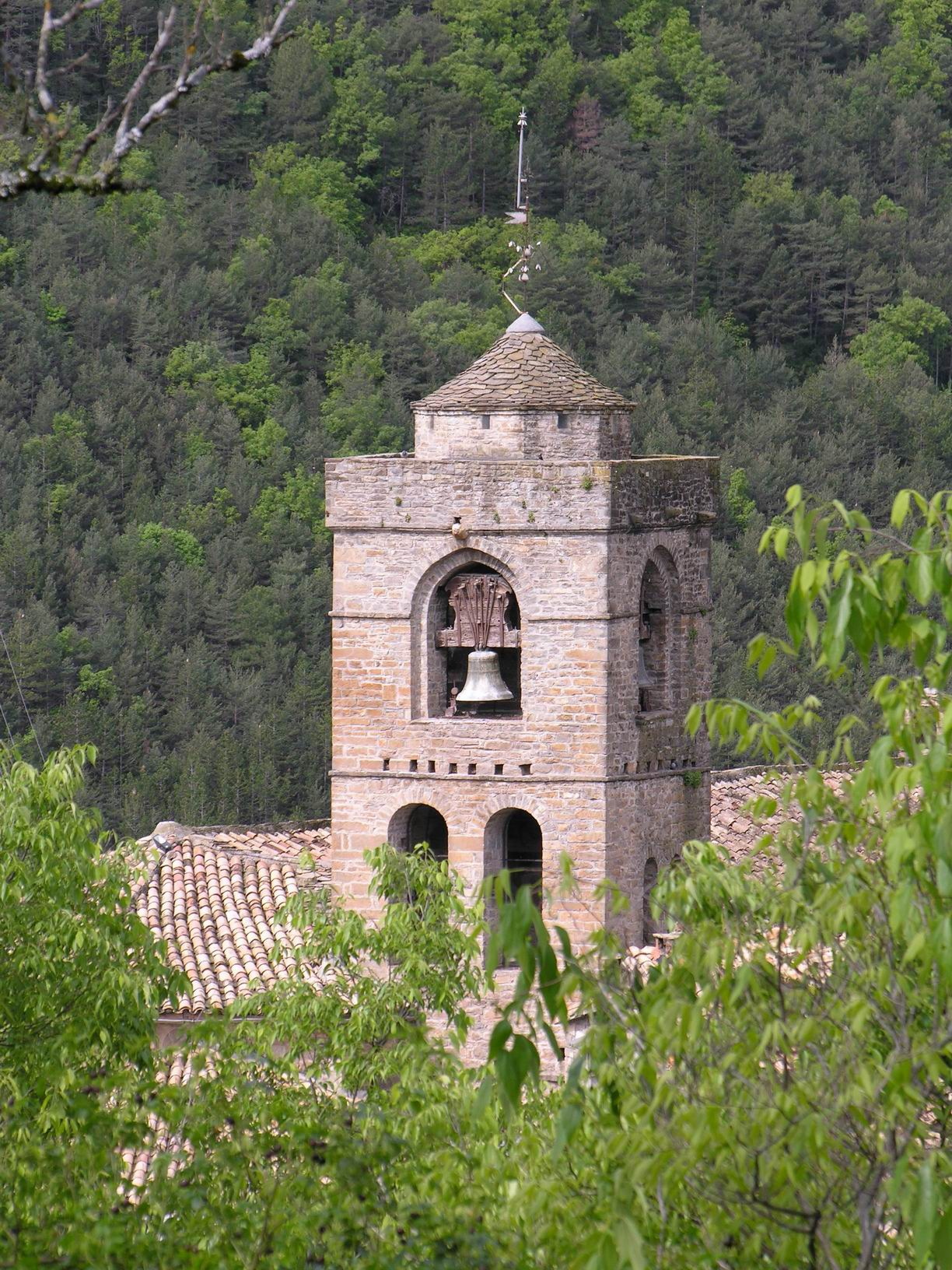 Campanar de Sant Pere Apòstol, Boltanya, Sobrarb